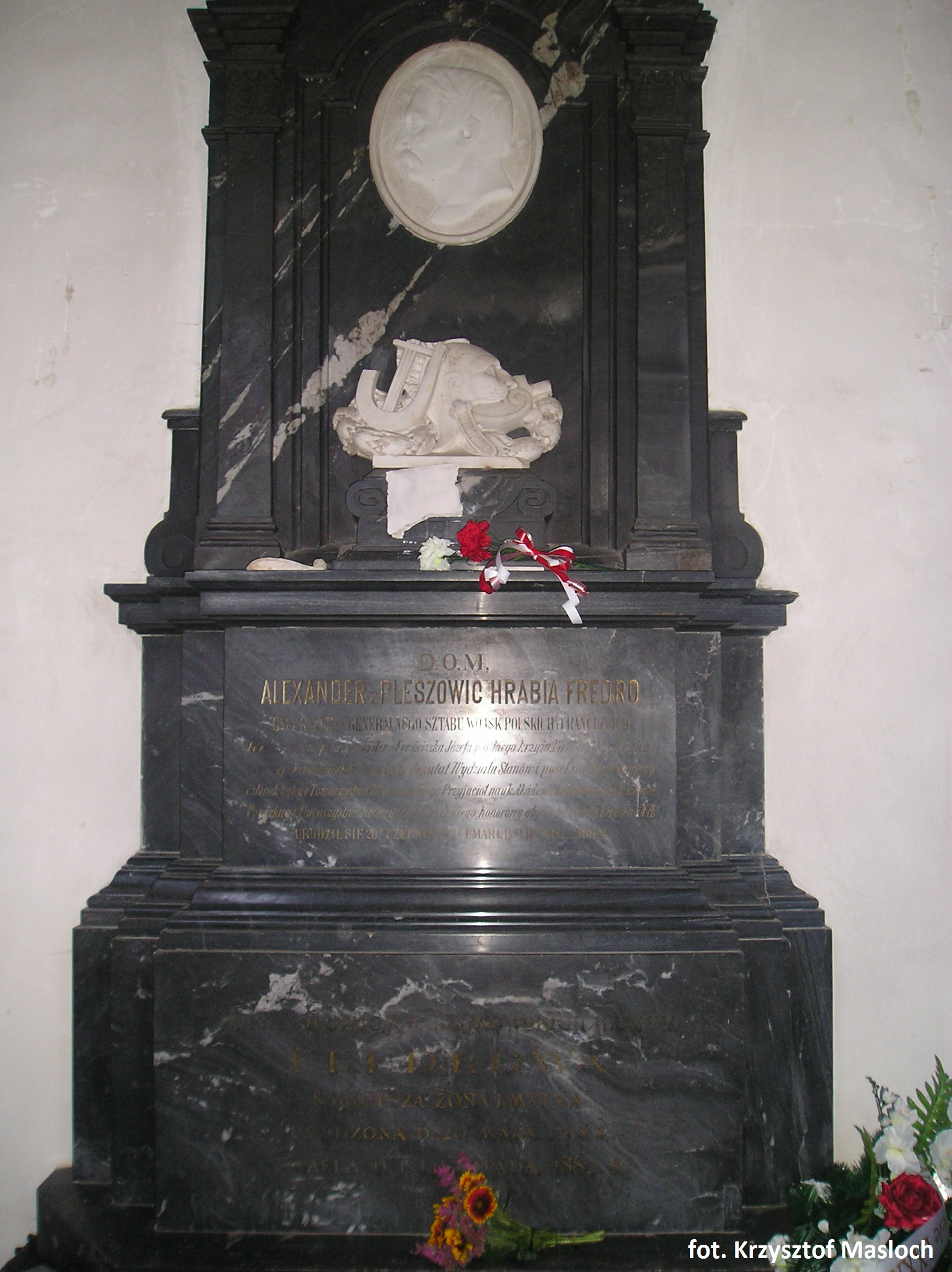 Sanktuarium Matki Bożej Rudeckiej miejsce pochówku Aleksandra Fredry (Ukraina)